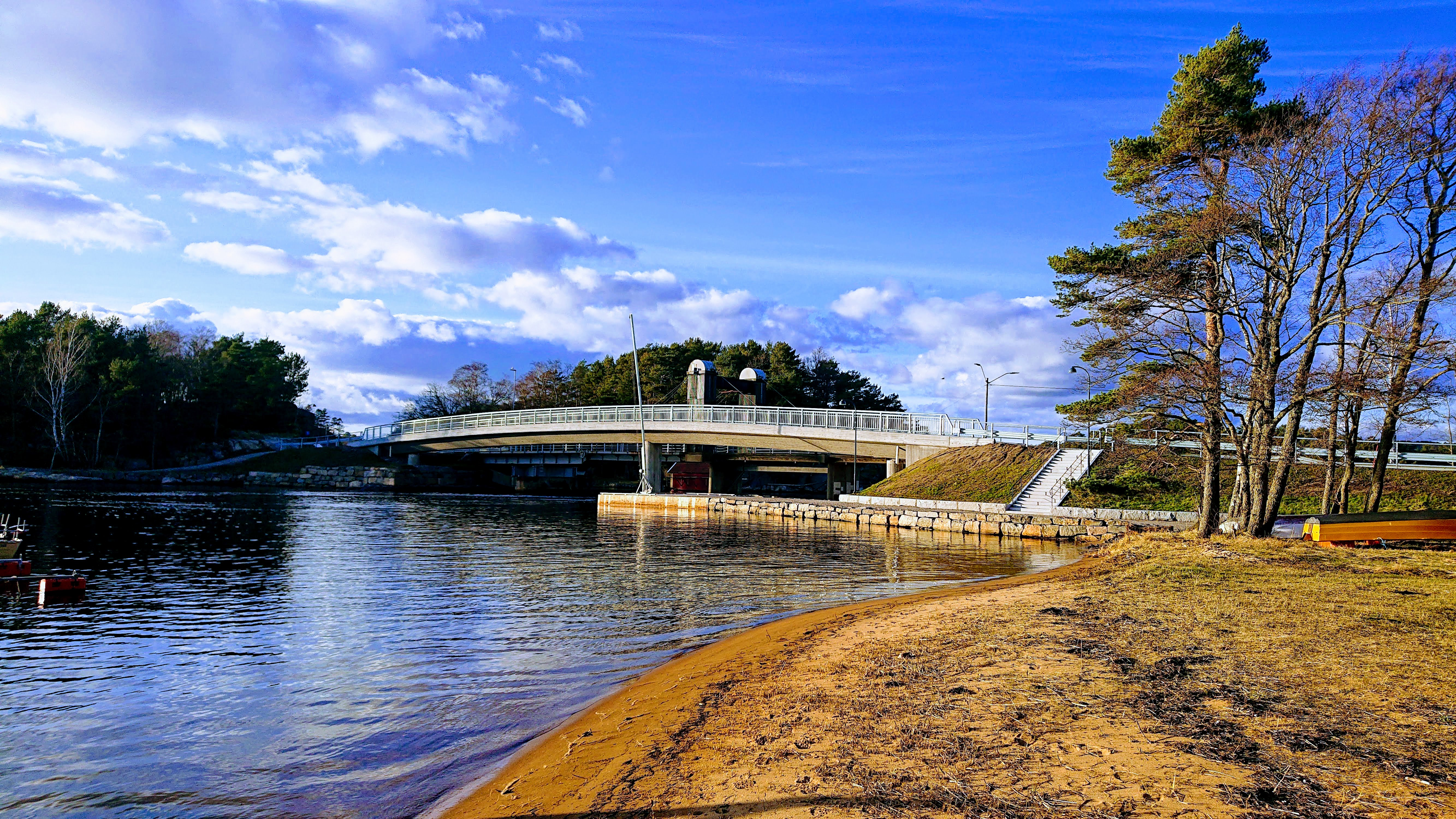 Bankebroa i Mandal. Gangbroen fra 2019 foran.